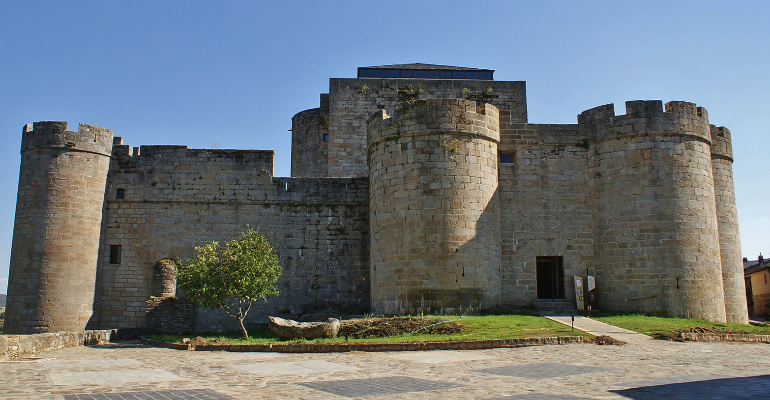 El castillo de los Condes de Benavente fue construido en el siglo XV. Forma parte del Conjunto Histórico de Puebla de Sanabria, Zamora. Castilla y León